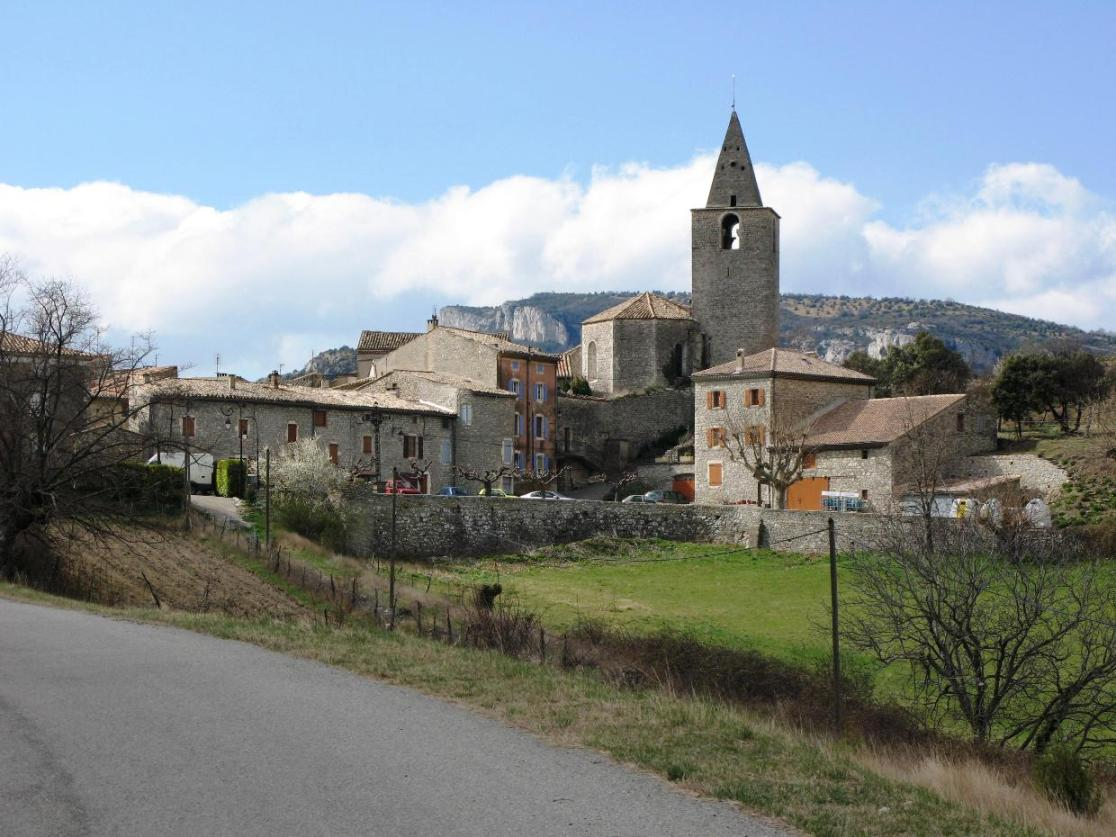 Village de Gras (Ardèche) et son église, inscrite M.H..